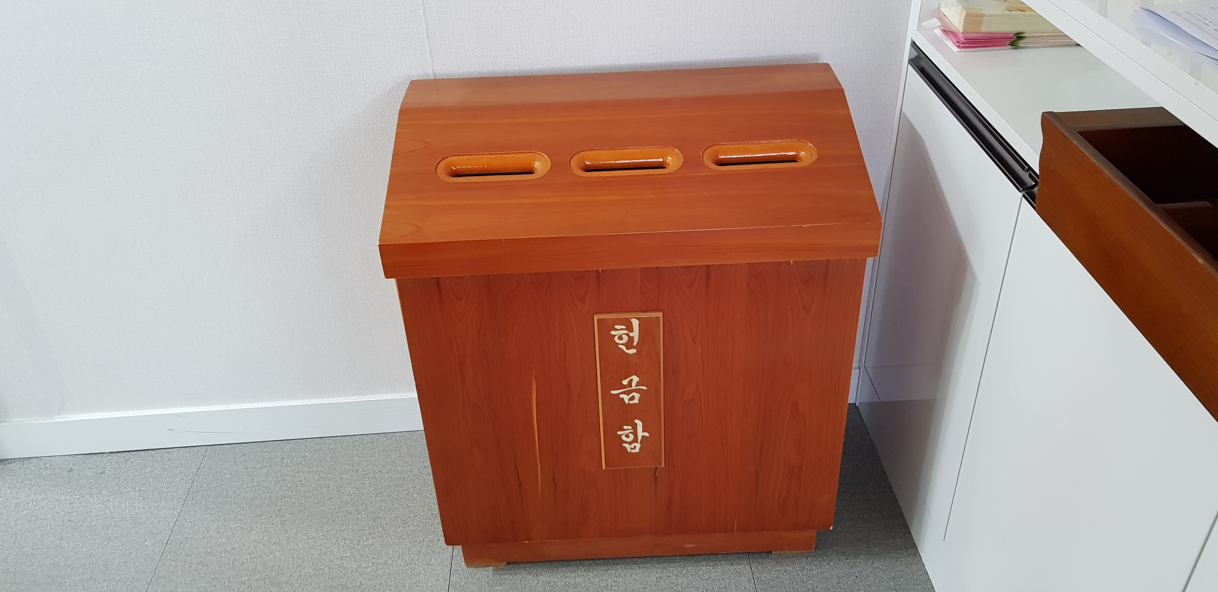 교회에 안에있는 헌금함